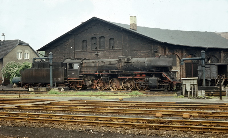 Schrottlok in Stendal.